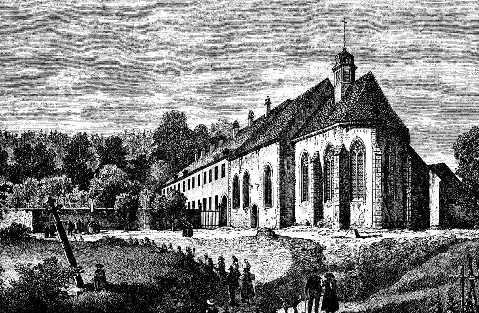 Pélerinage des Trois-Epis autrefois (Charles Grad, L'Alsace, le pays et ses habitants, Hachette, 1906 (rééd.), p. 83)